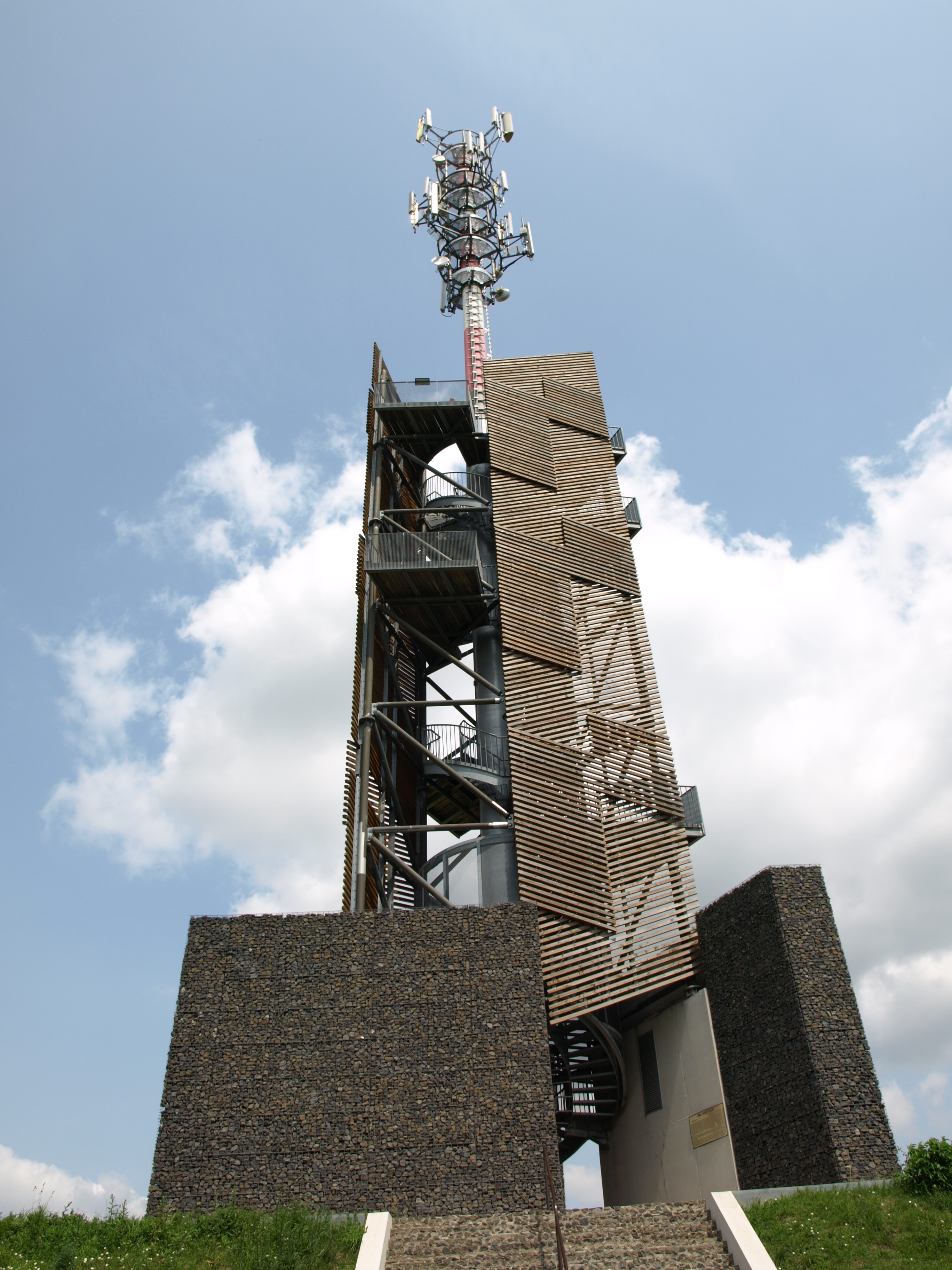 Rozhledna Romanka